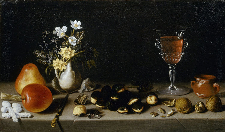 Miguel Vicente (1600-1640), Bodegón, óleo sobre lienzo, 34 x 57 cm. Rafael Valls, Londres.